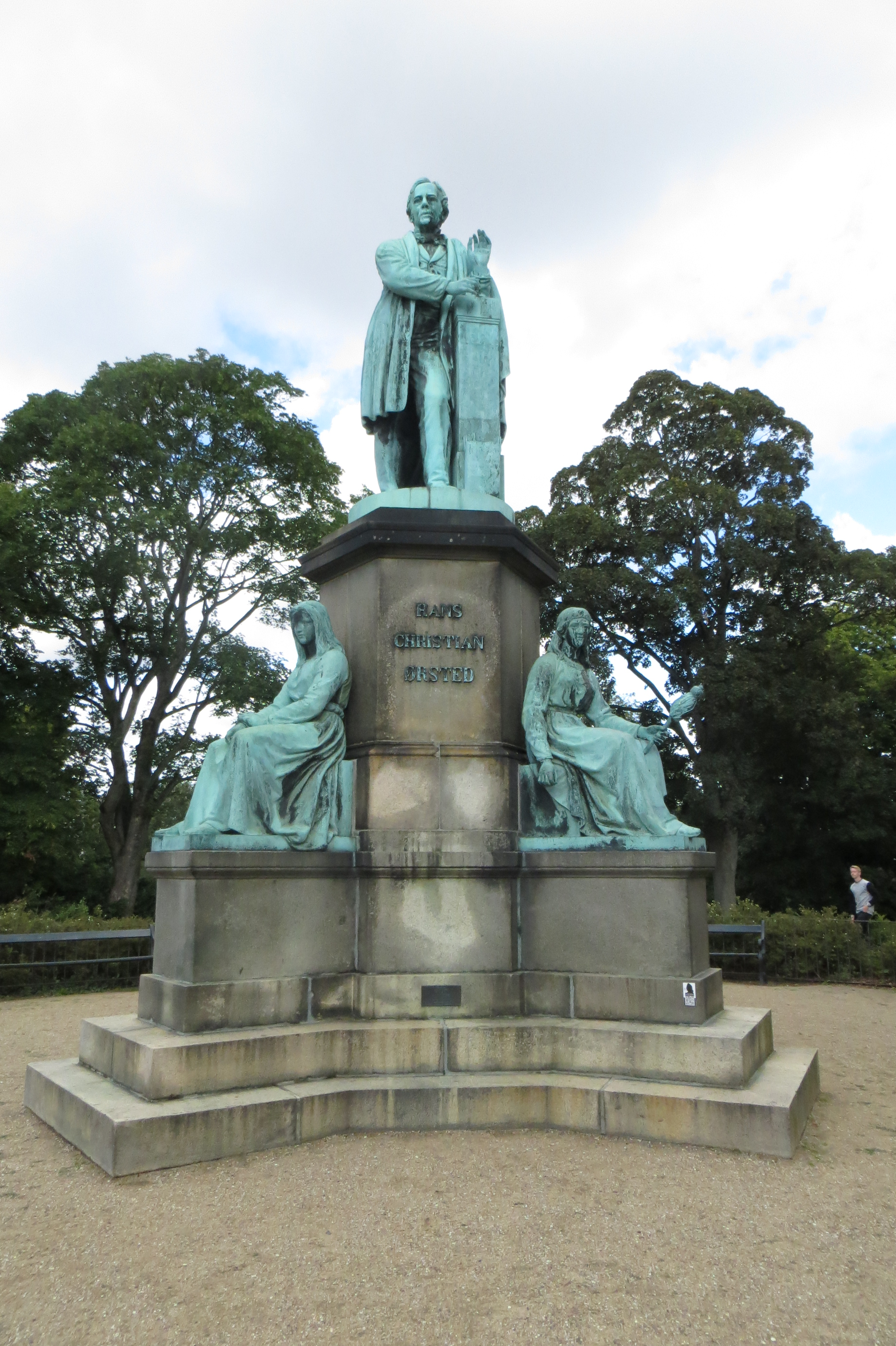 H. C. Ørsted Monument in Ørstedparken in Copenhagen, Denmark